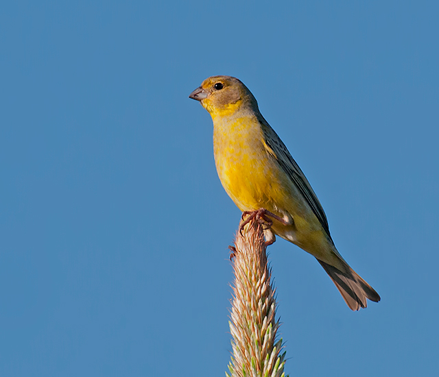 Piraju-SP - Brasil